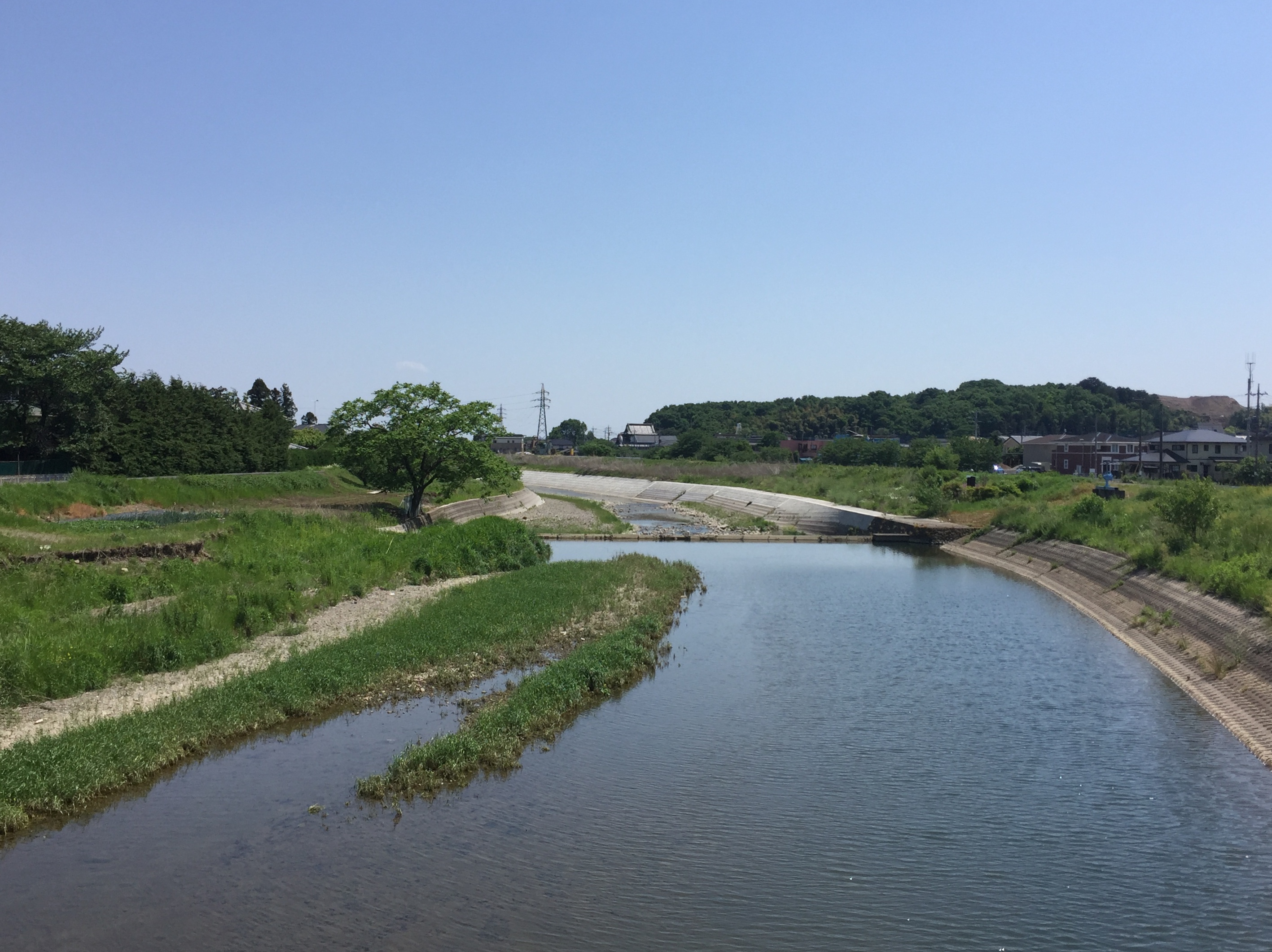 栃木県栃木市を流れる永野川。平井町の二杉橋から撮影。